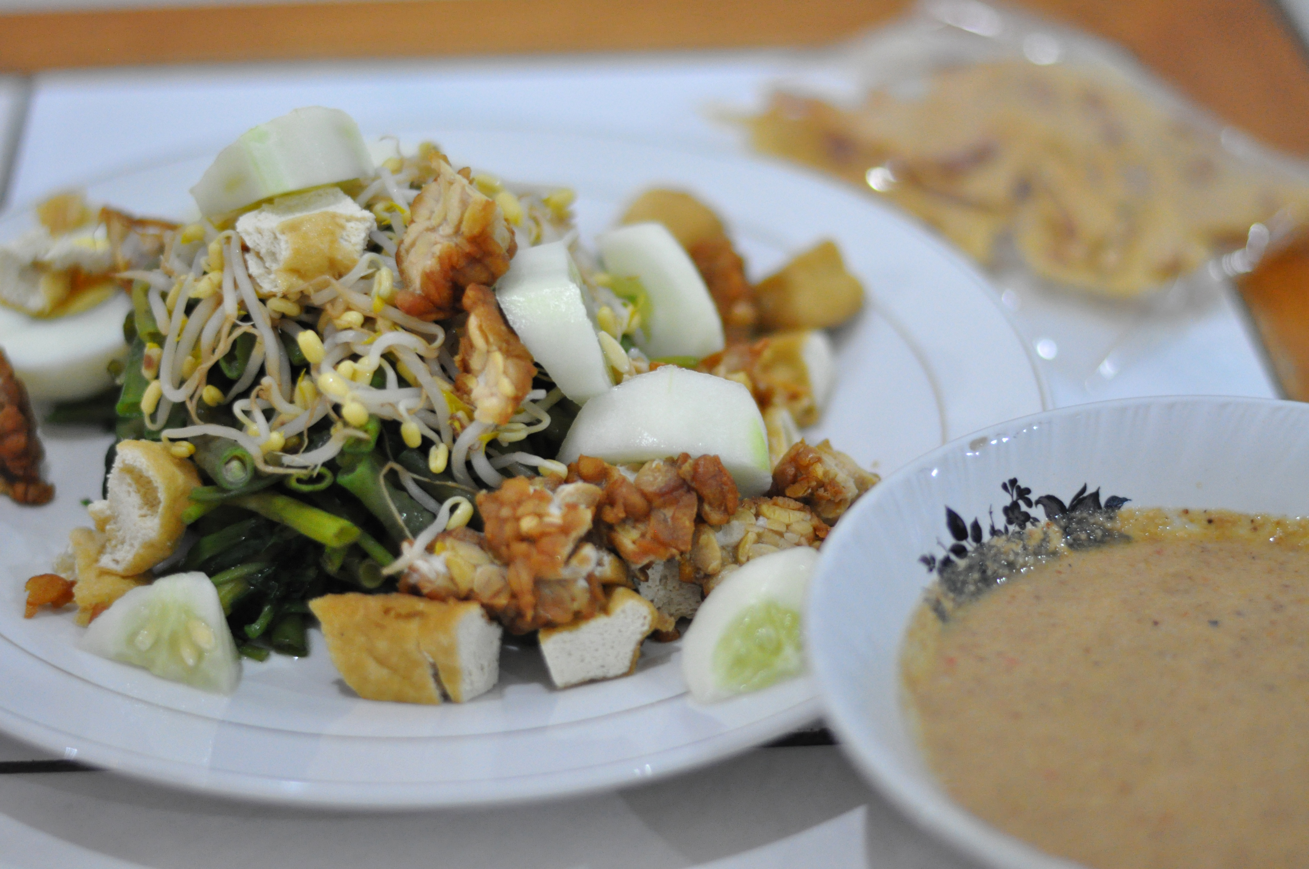 バリのガドガド